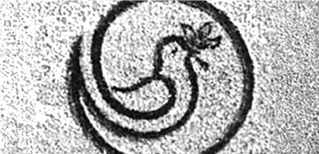 Խորհրդանիշ Աղավնի